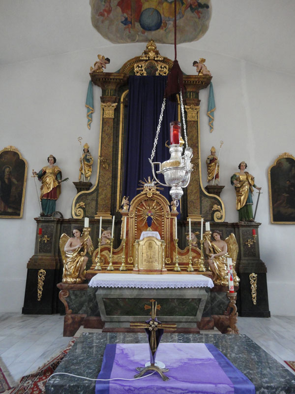 Altar Pfarrkirche Donnersbach